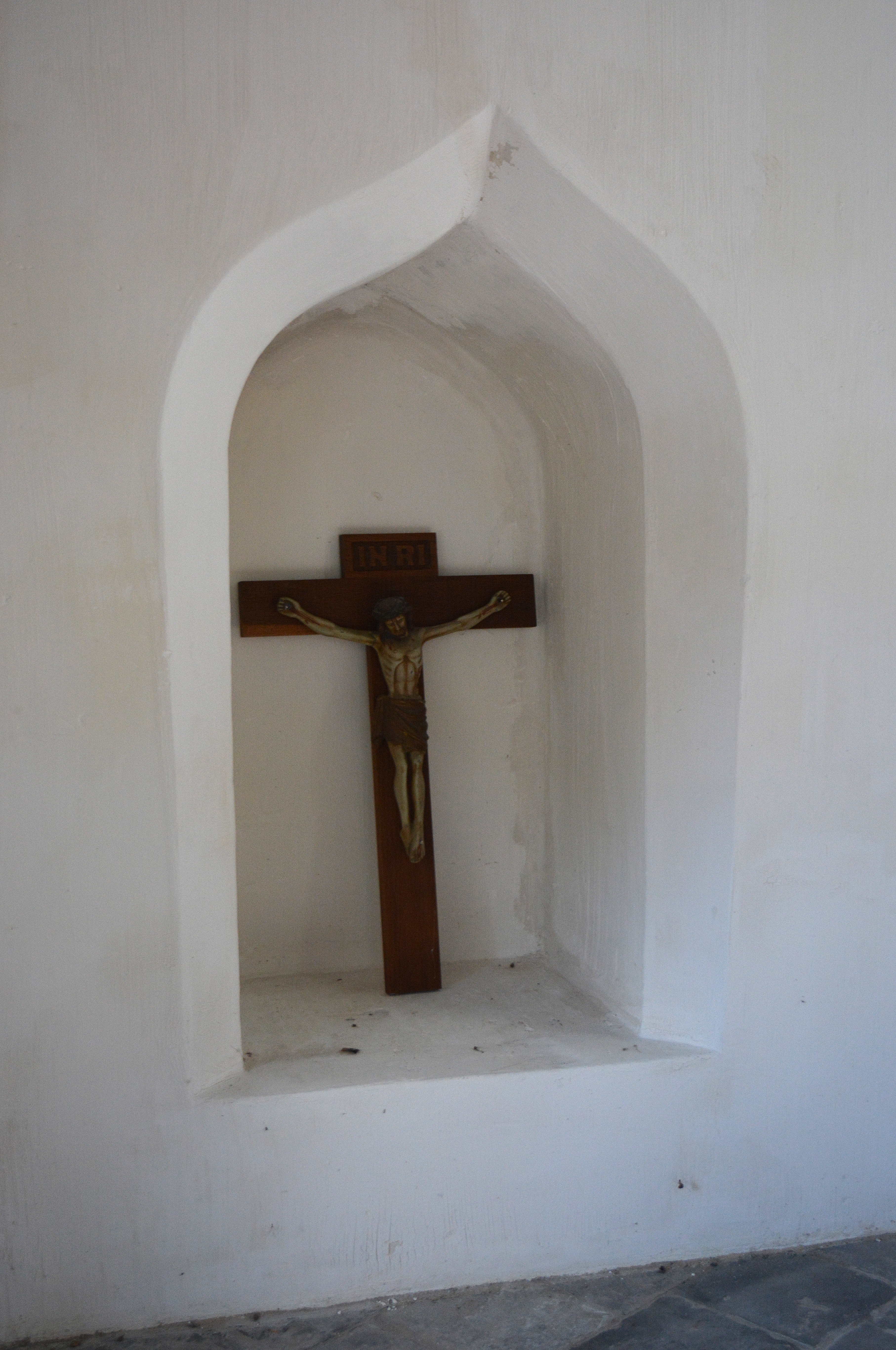 Lichtaard, Petruskerk, piscina